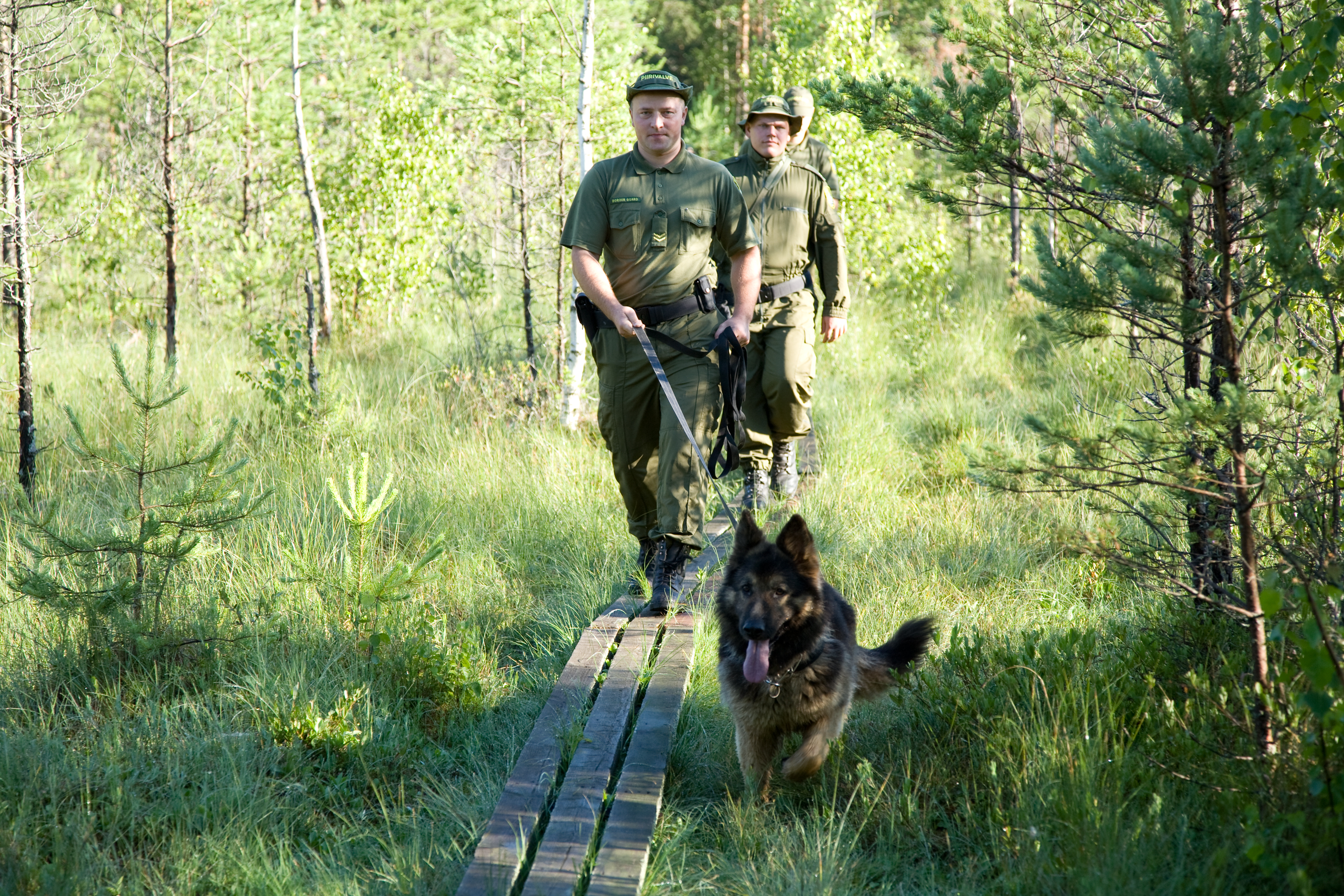 Piiripatrull teenistuskoeraga.